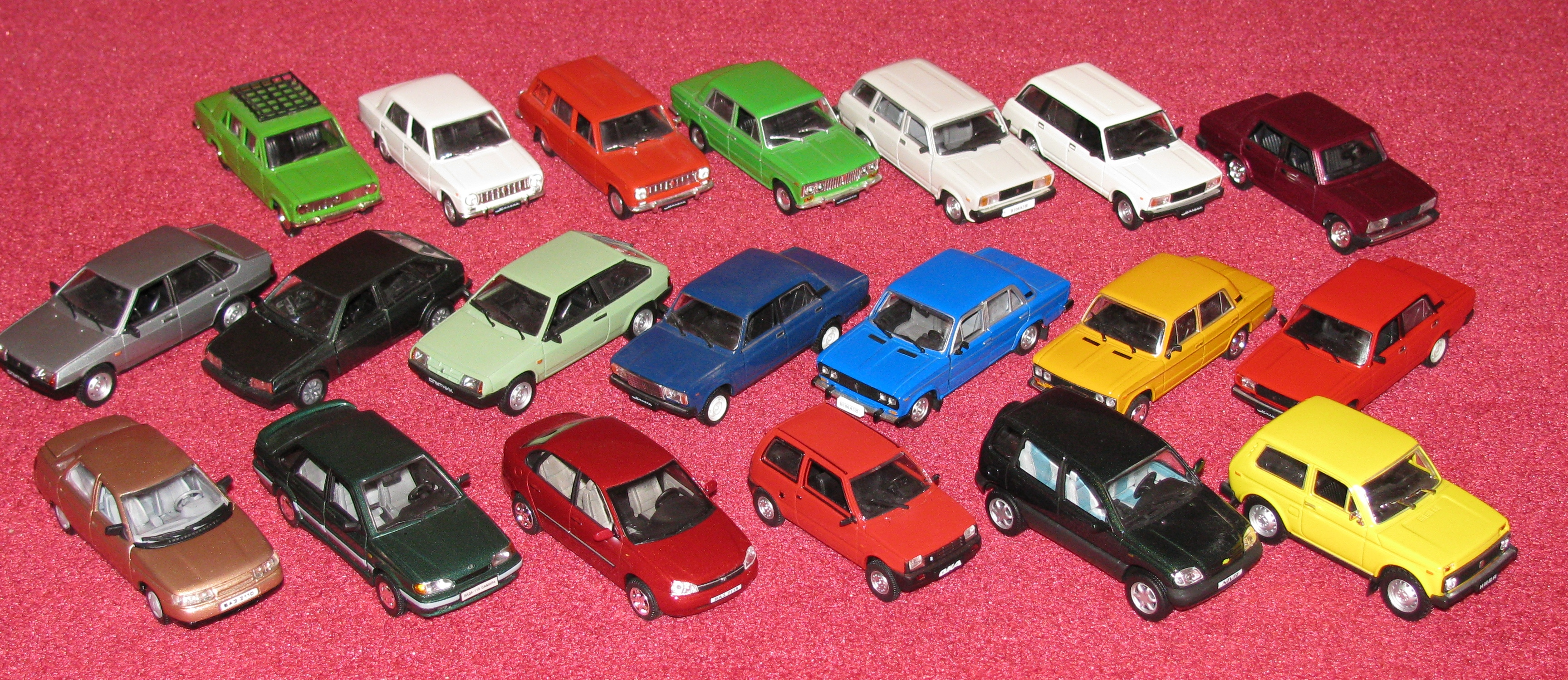 ВАЗ 1:43